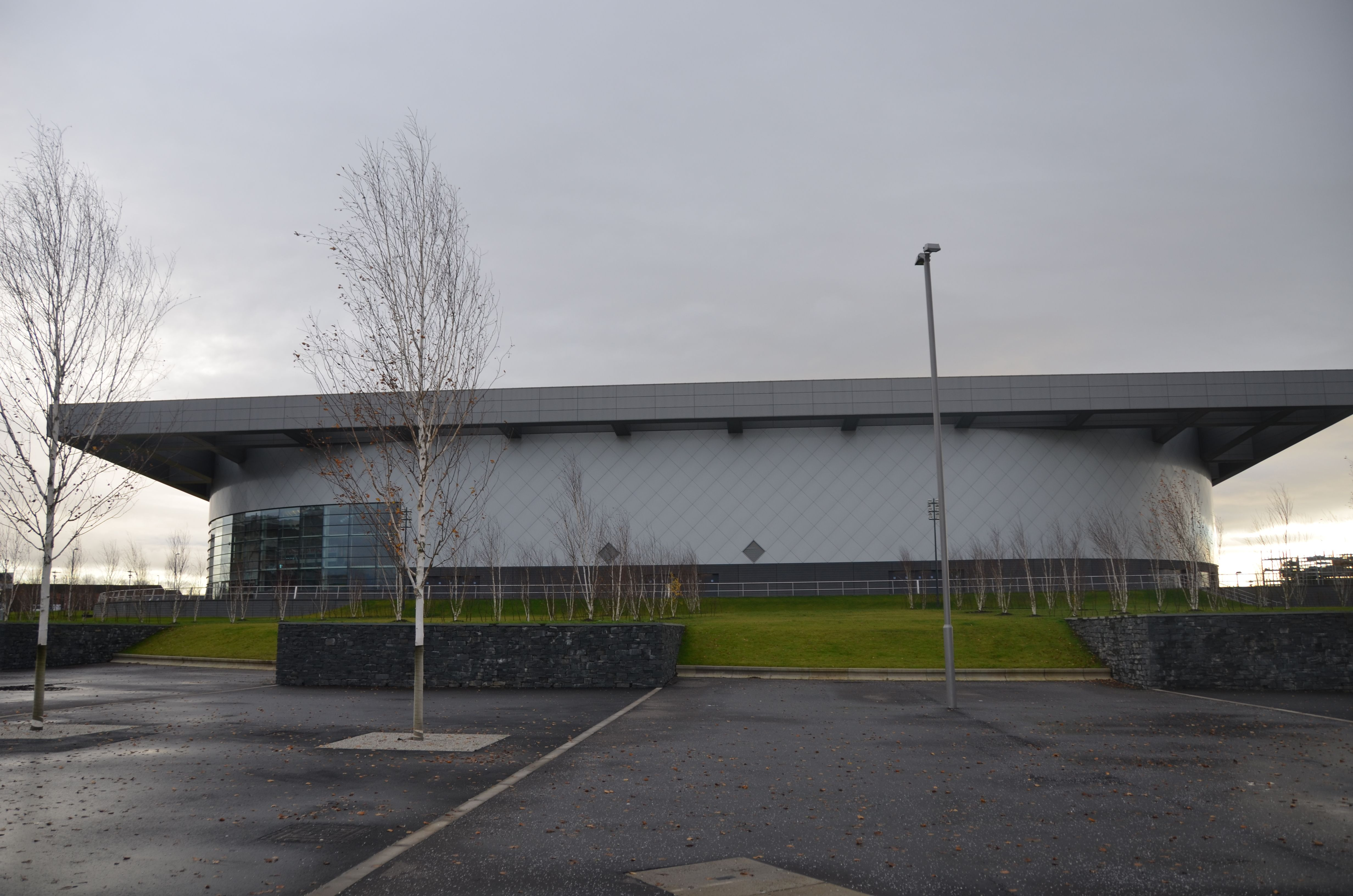 Sir Chris Hoy Velodrome, Bahnrad-Weltcup 2012